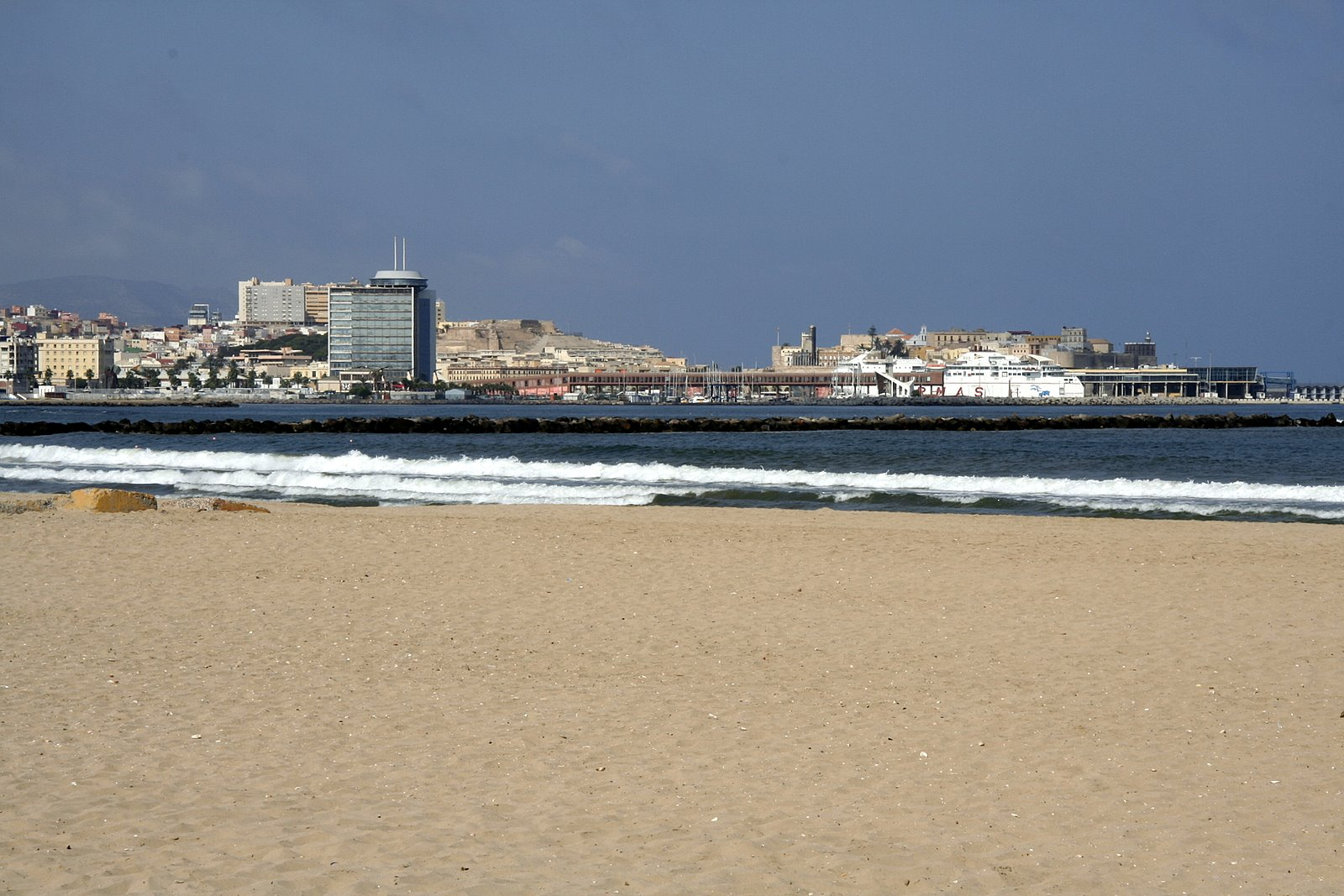 Puerto de Melilla desde la playa de la Hípica